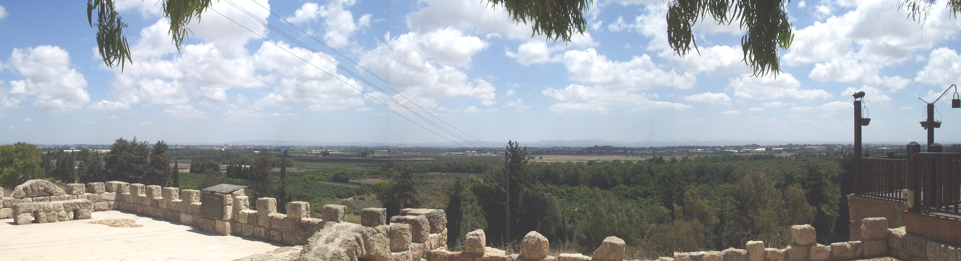 עמק חפר. מראה מכוון "מצפה רמי" בית ראשונים בביתן אהרון